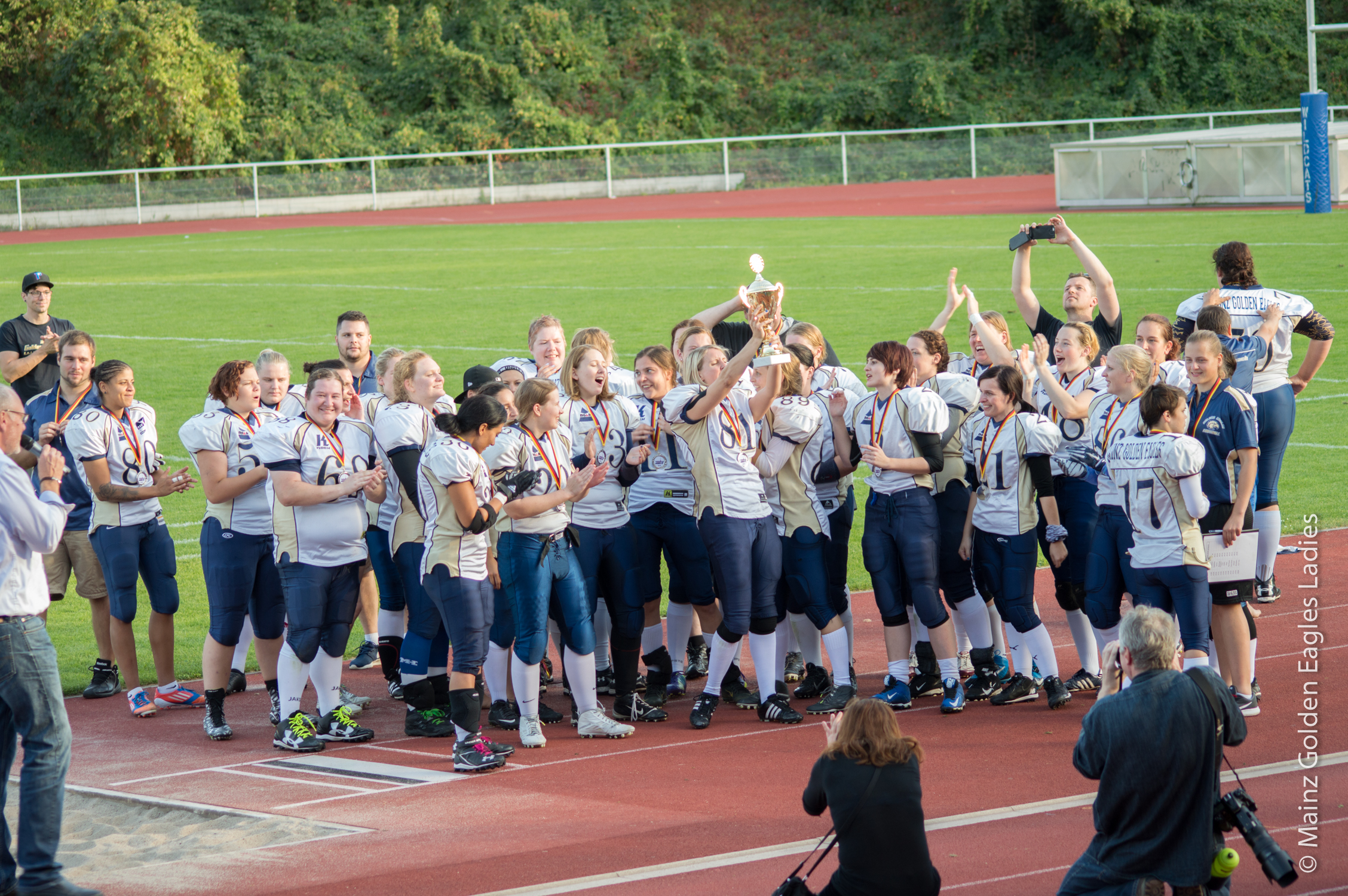 Die TSV SCHOTT Mainz Golden Eagles Ladies werden deutscher Vizemeister 2016 in Berlin im Ladiesbowl XXV